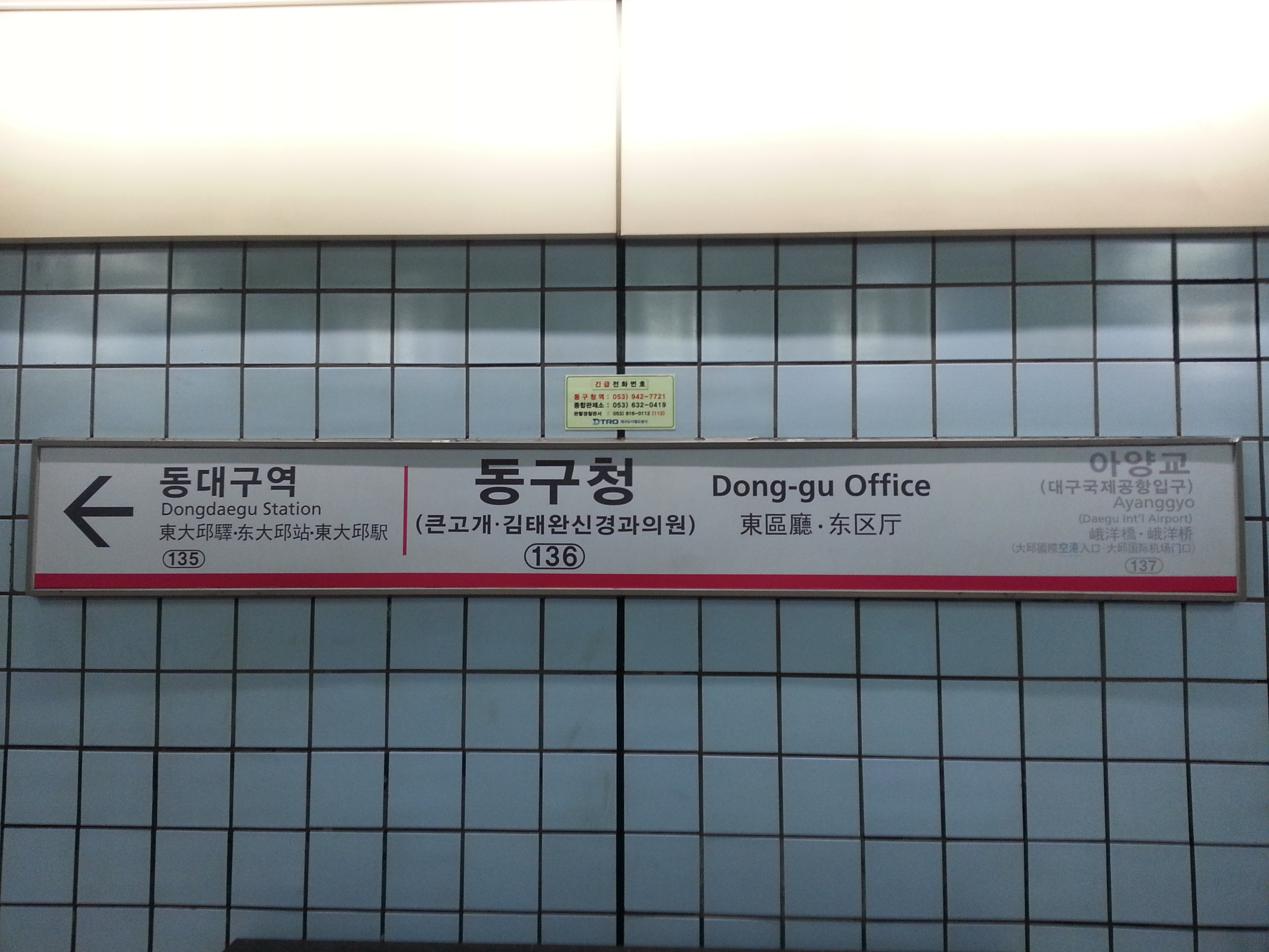 대구 도시철도 1호선 동구청(옛, 큰고개역)역 설화명곡 방면 역명판